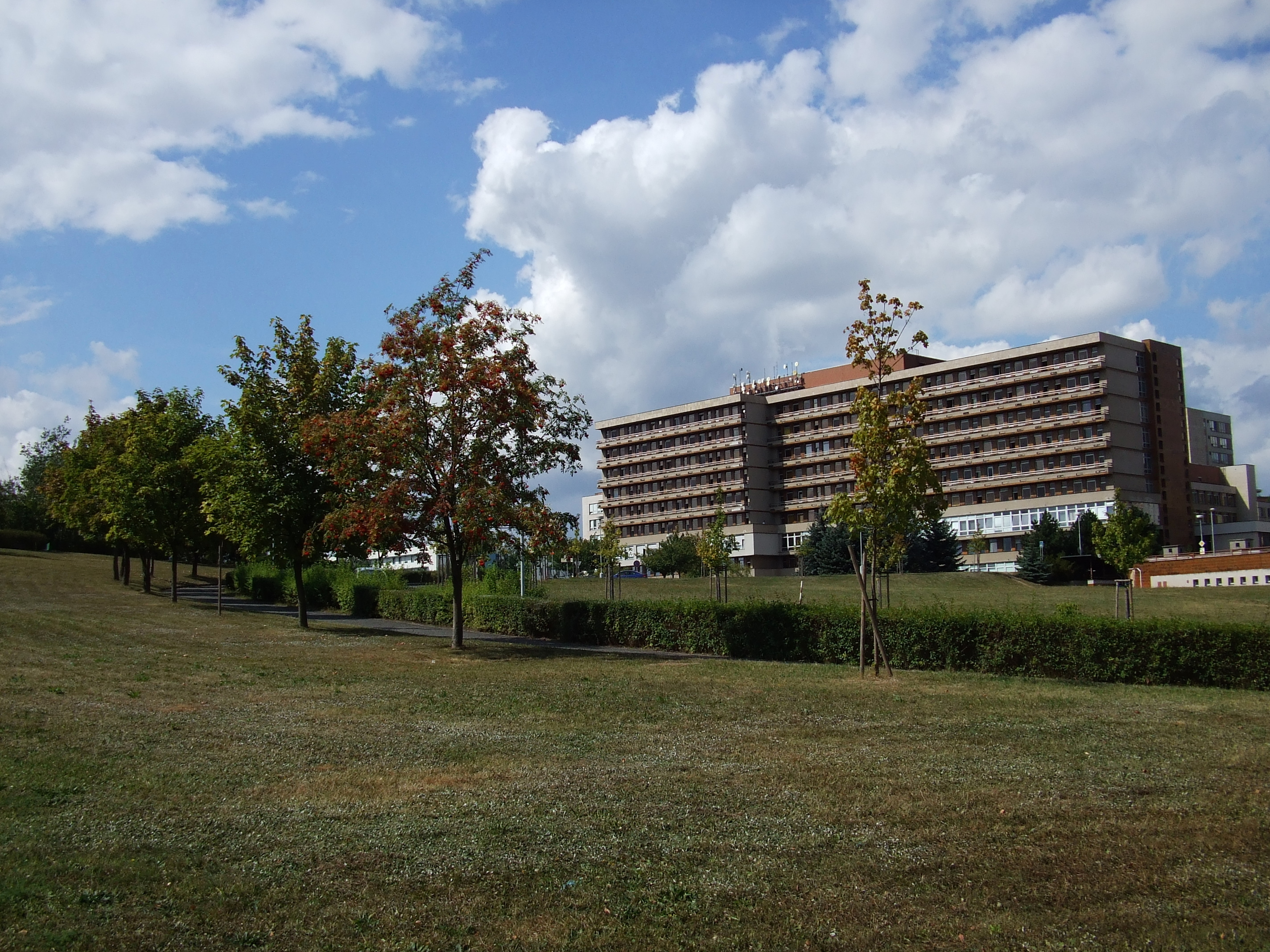 areál fakultní nemocnice Lochotín